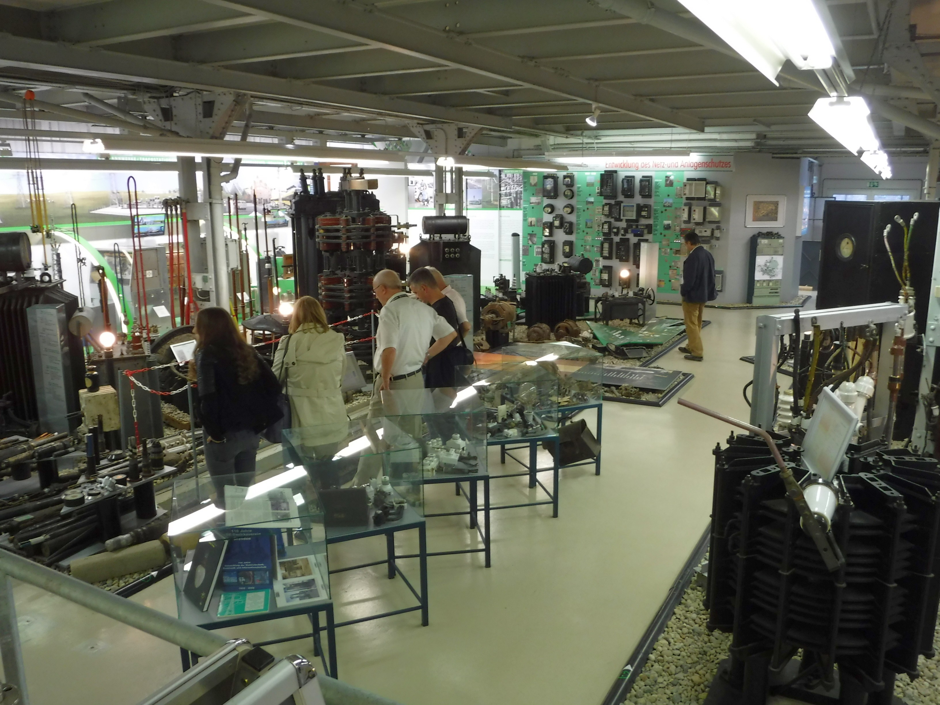 Blick in den "Strom"-Bereich des Dresdner Energiemuseums